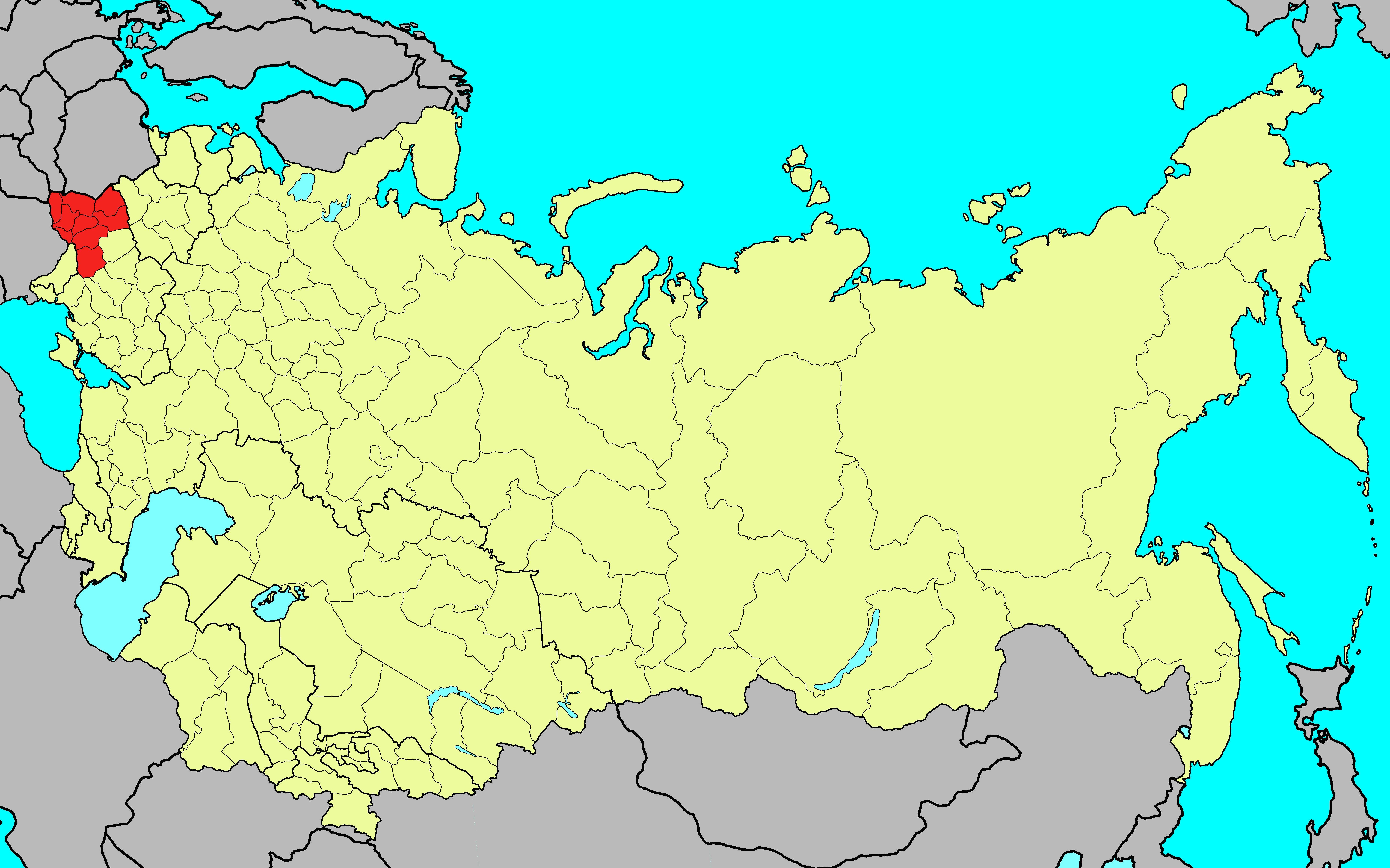 Прикарпатский военный округ ВС СССР на 1991 год